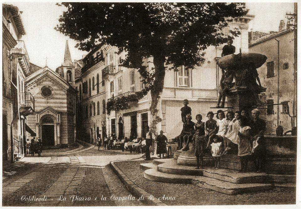 Vecchia fotografia in bianco e nero ritraente Coldirodi e La 'Pila' Della Piazza di San Sebastiano e sul fondo l'Oratorio di Sant'Anna, foto scattata negli anni '40. Tradizionale rappresentazione fotgrafica di Coldirodi.